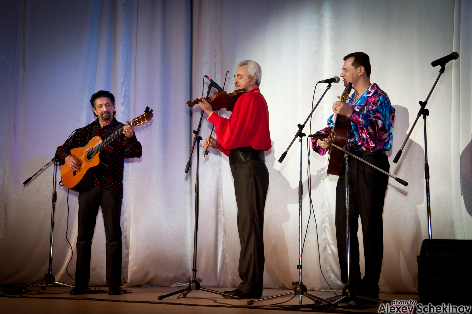 Московский музыкально-драматический цыганский театр «Ромэн»; концерт в ЦКиОМ города Северодвинска 23 февраля 2014 года.